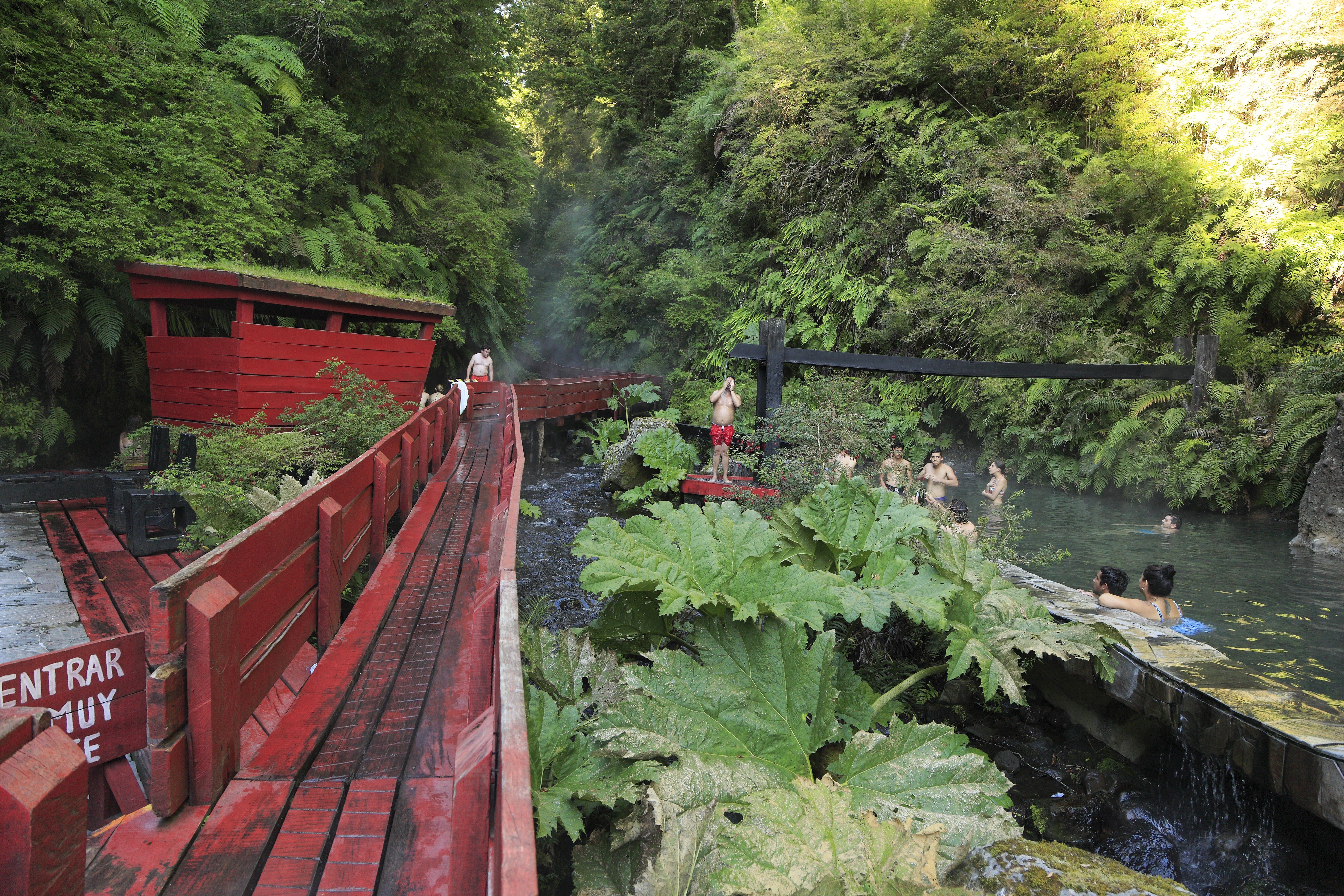 Bergwärts, im Hintergrund beginnt der engste Abschnitt der Klamm. Das Becken links ist außer Betrieb, in der Regel zur Reinigung.